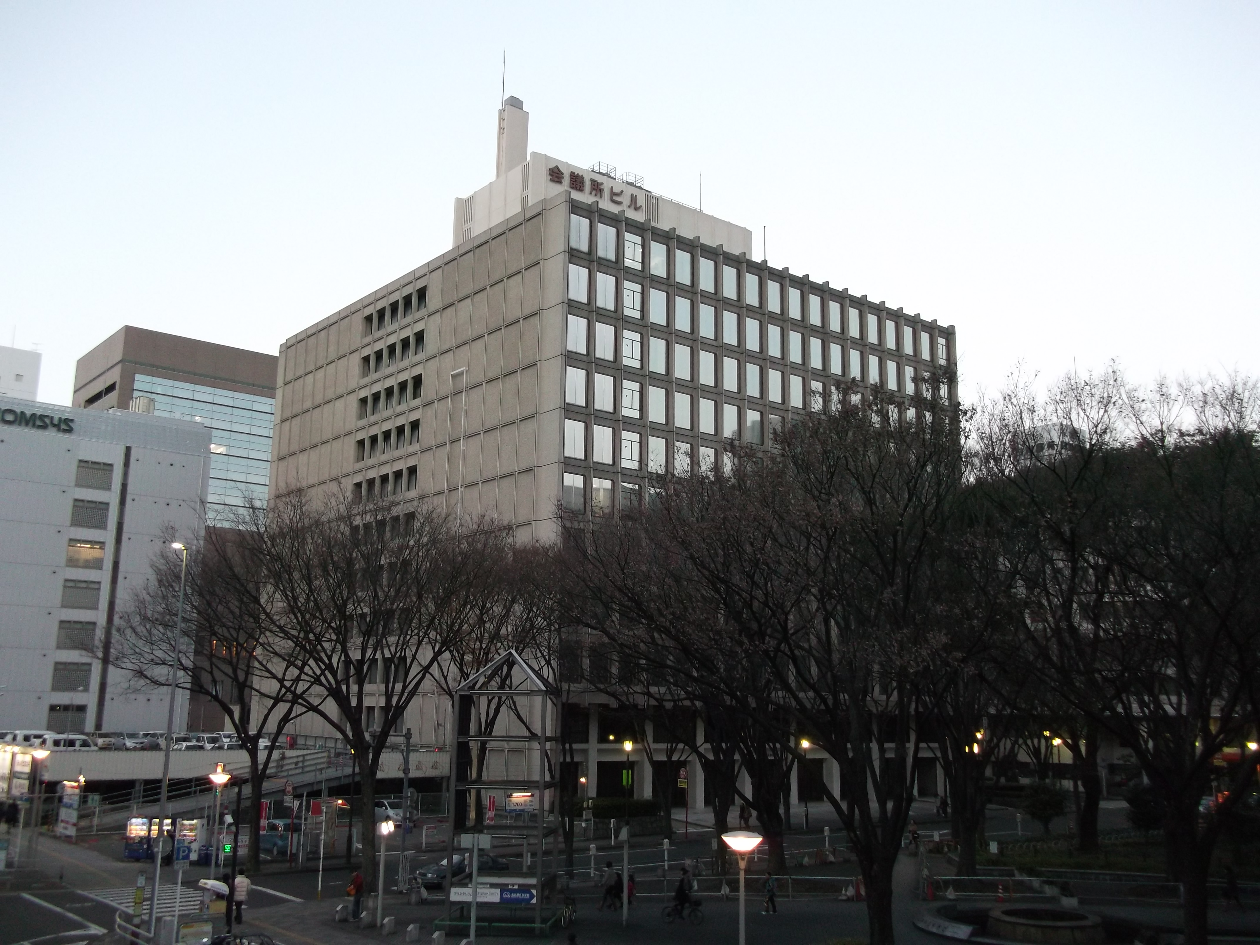 名古屋市中区栄にある名古屋商工会議所ビルを南西角から写す